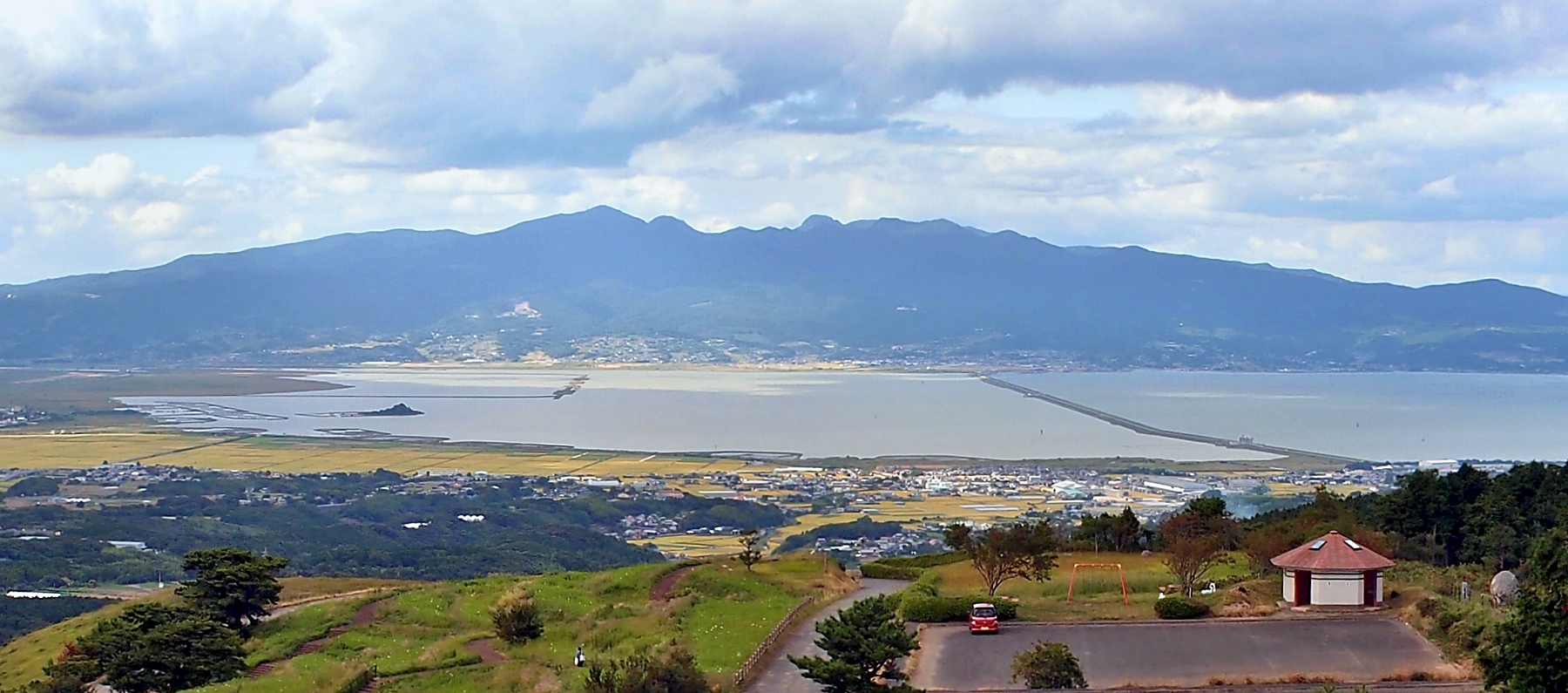 諫早湾干拓事業の調整池と潮受け堤防（写真右側の線に見える部分）。後方は多良岳火山の山体。牧場の里あづま公園からの撮影。